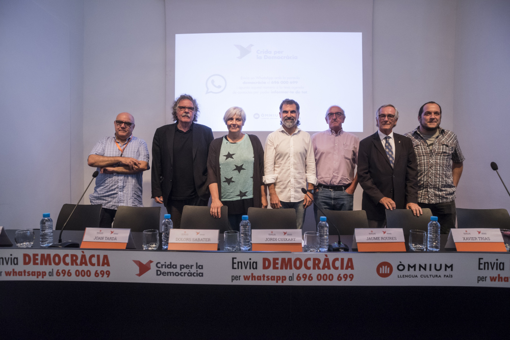 Presentem el nou projecte 'Crida per la Democràcia', una iniciativa que apel·la tots els demòcrates i que va molt més enllà de l'entitat.